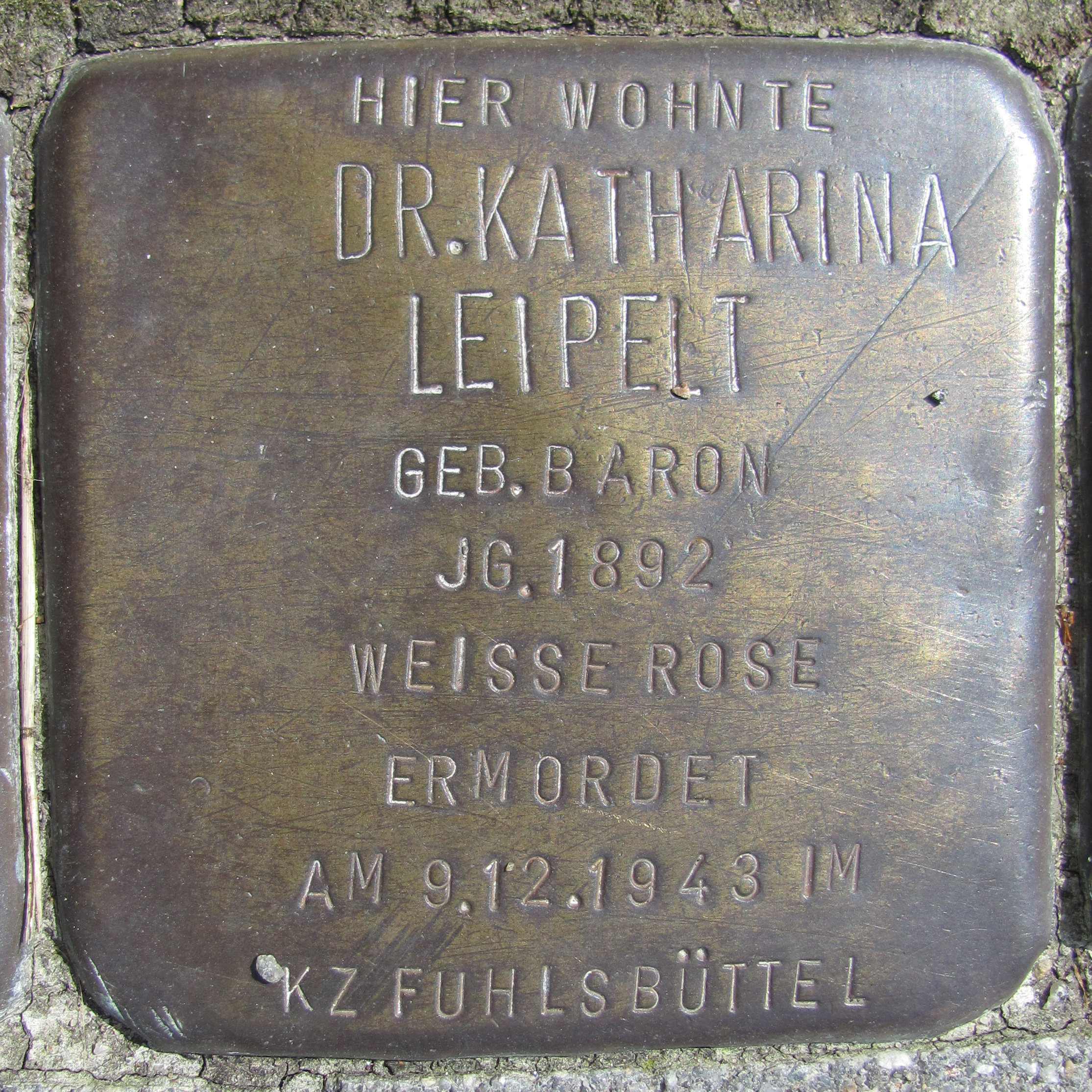 Stolperstein für Katharina Leipelt vor dem Haus Mannesallee 20